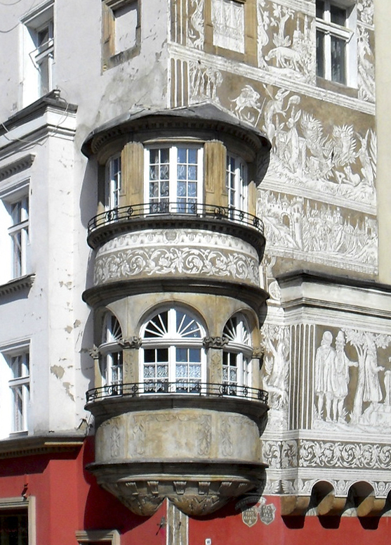 Kamienica „Pod Przepiórczym Koszem” Legnica, Rynek 38